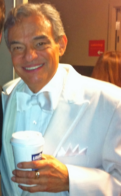 Jose Enrique con el Principe de la cancion Jose Jose